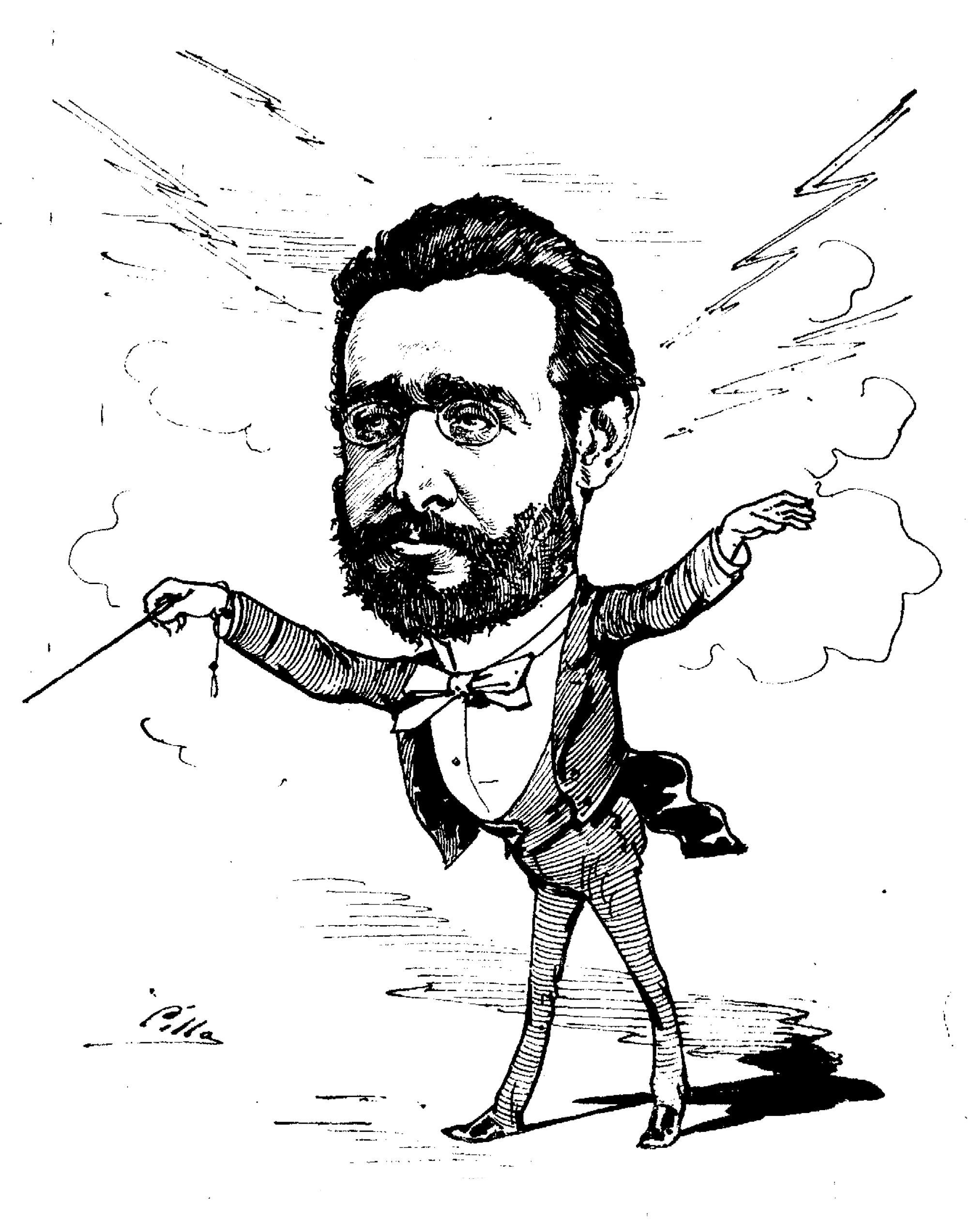 Ruperto Chapí.